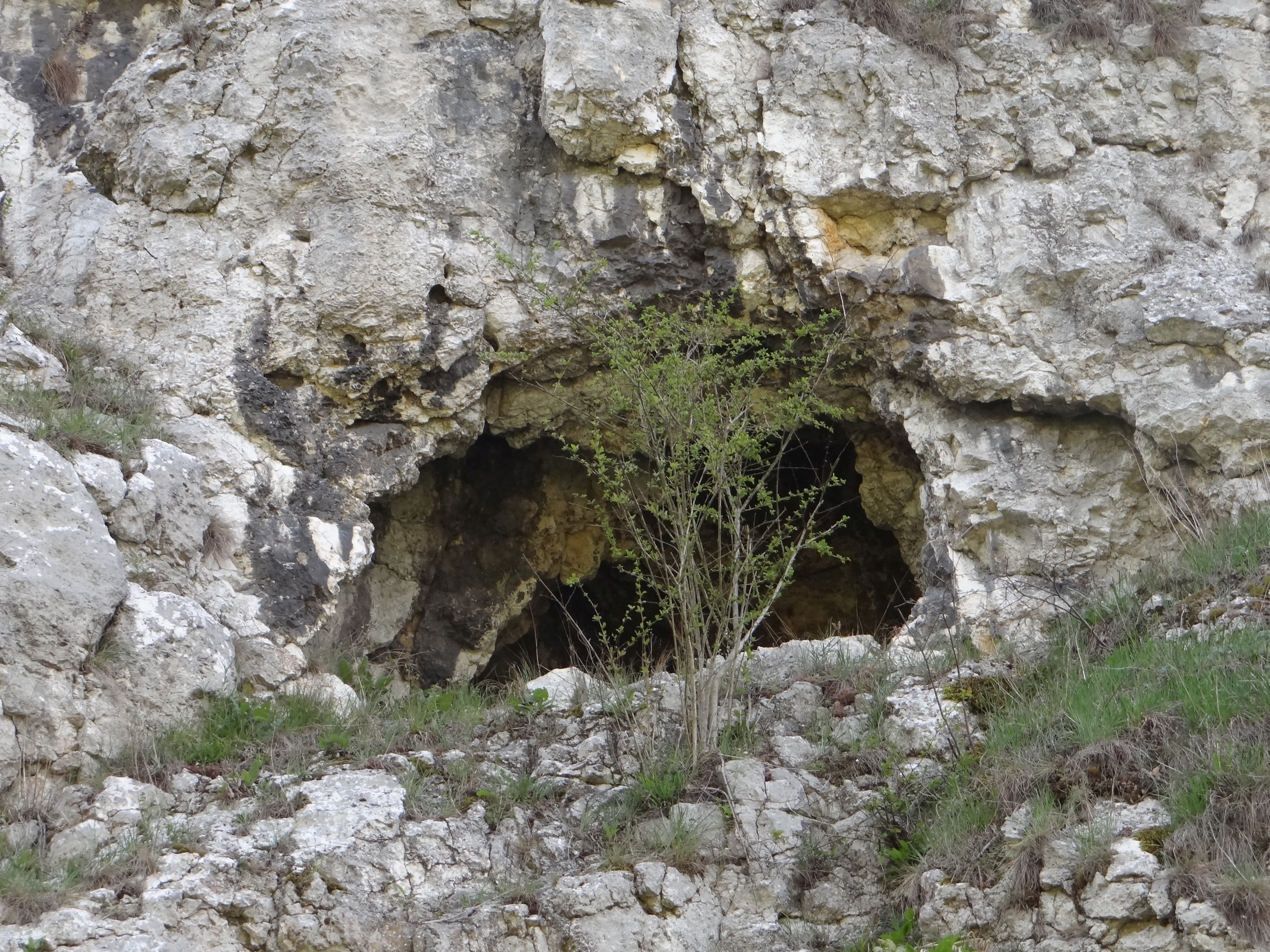 Okno Sokole I w Turni z Grotami w Dolinie Bolechowickiej